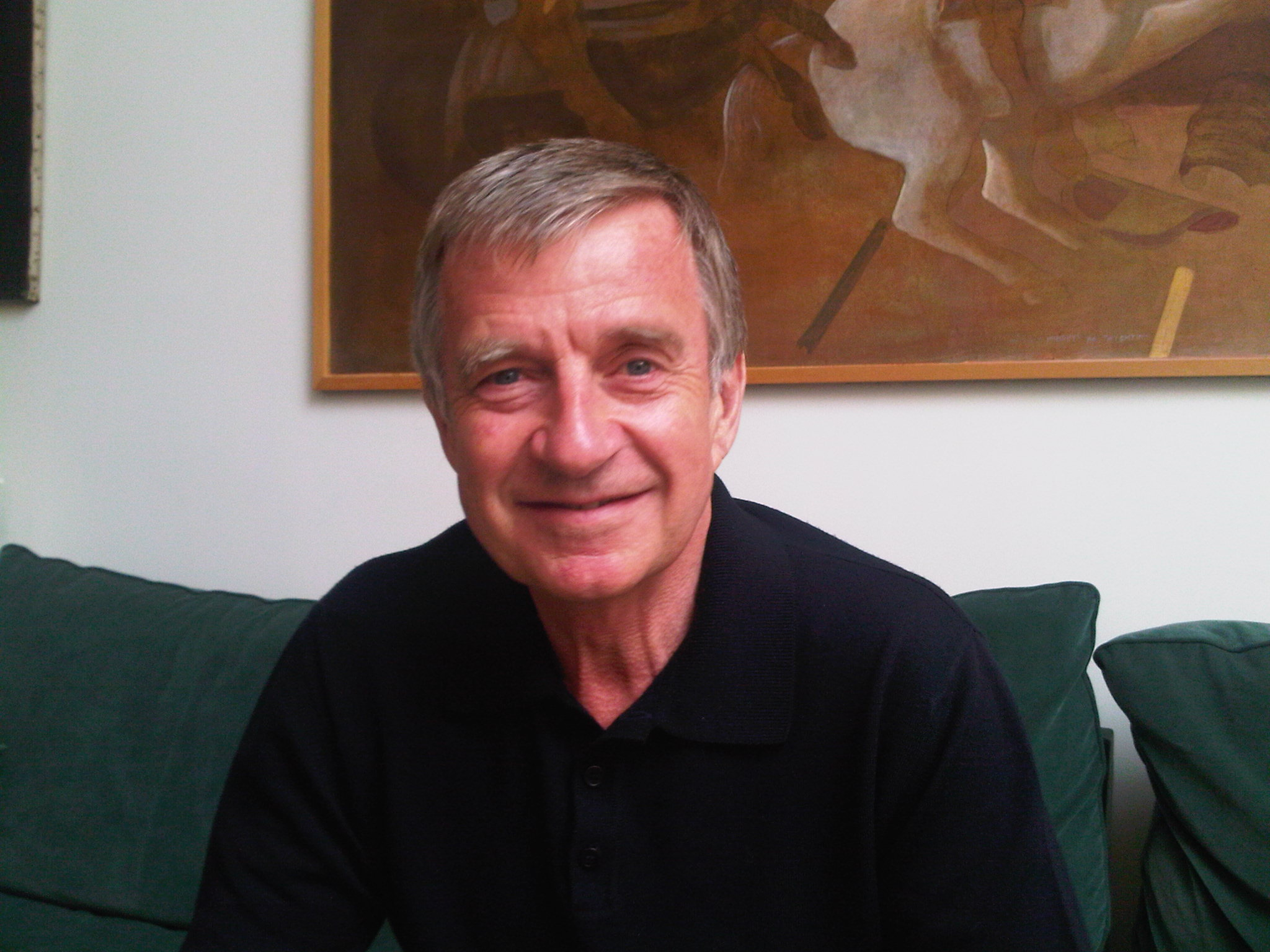 Yves Agid